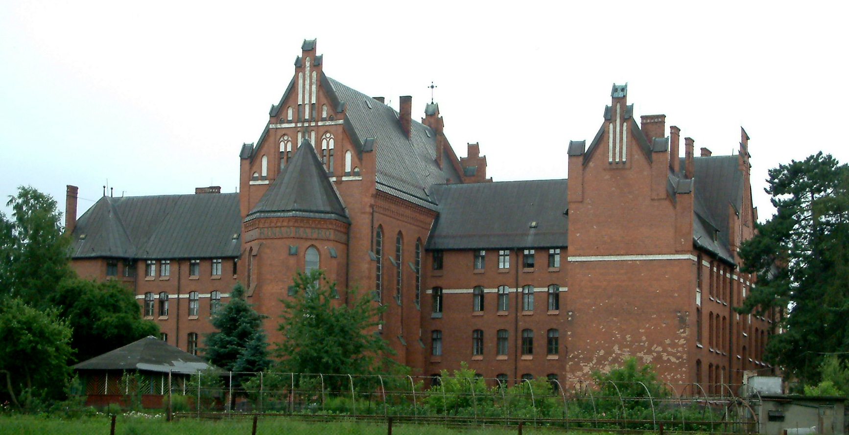 Klasztor Zgromadzenia Sióstr św. Katarzyny Braniewo